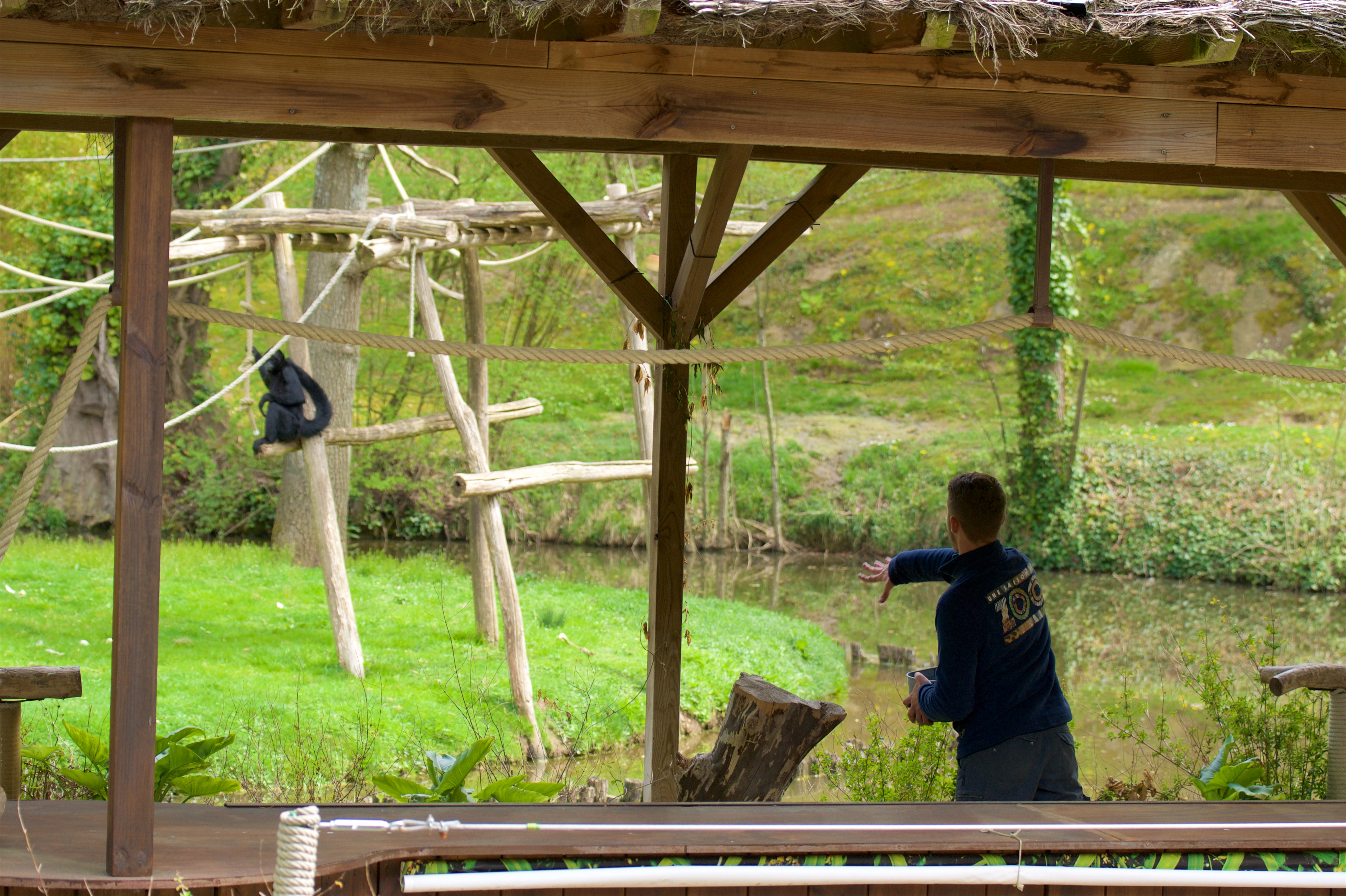 tournage de la saison 5 de l'émission Une saison au zoo